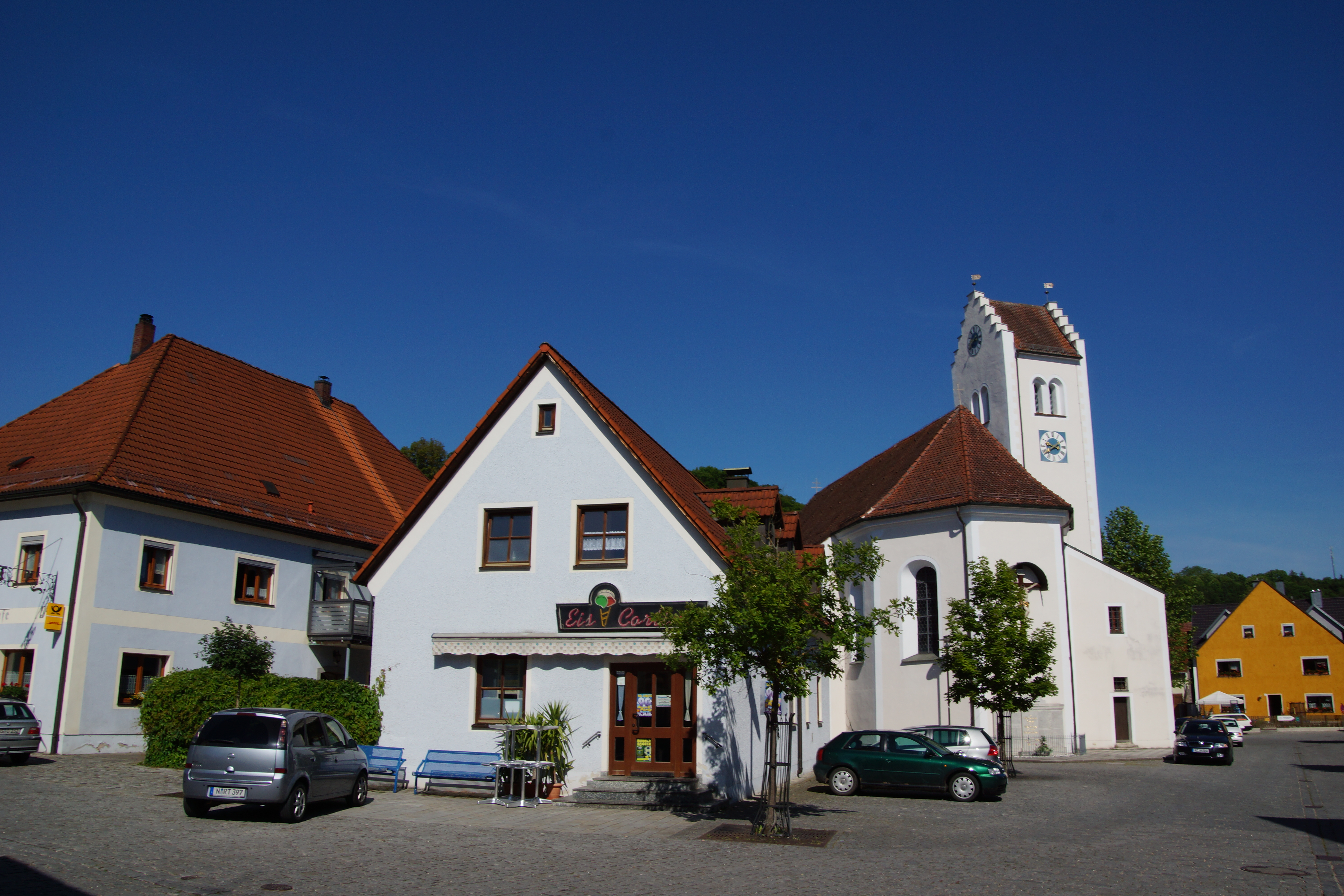 Der Oberpfälzer Markt Rieden im Vilstal